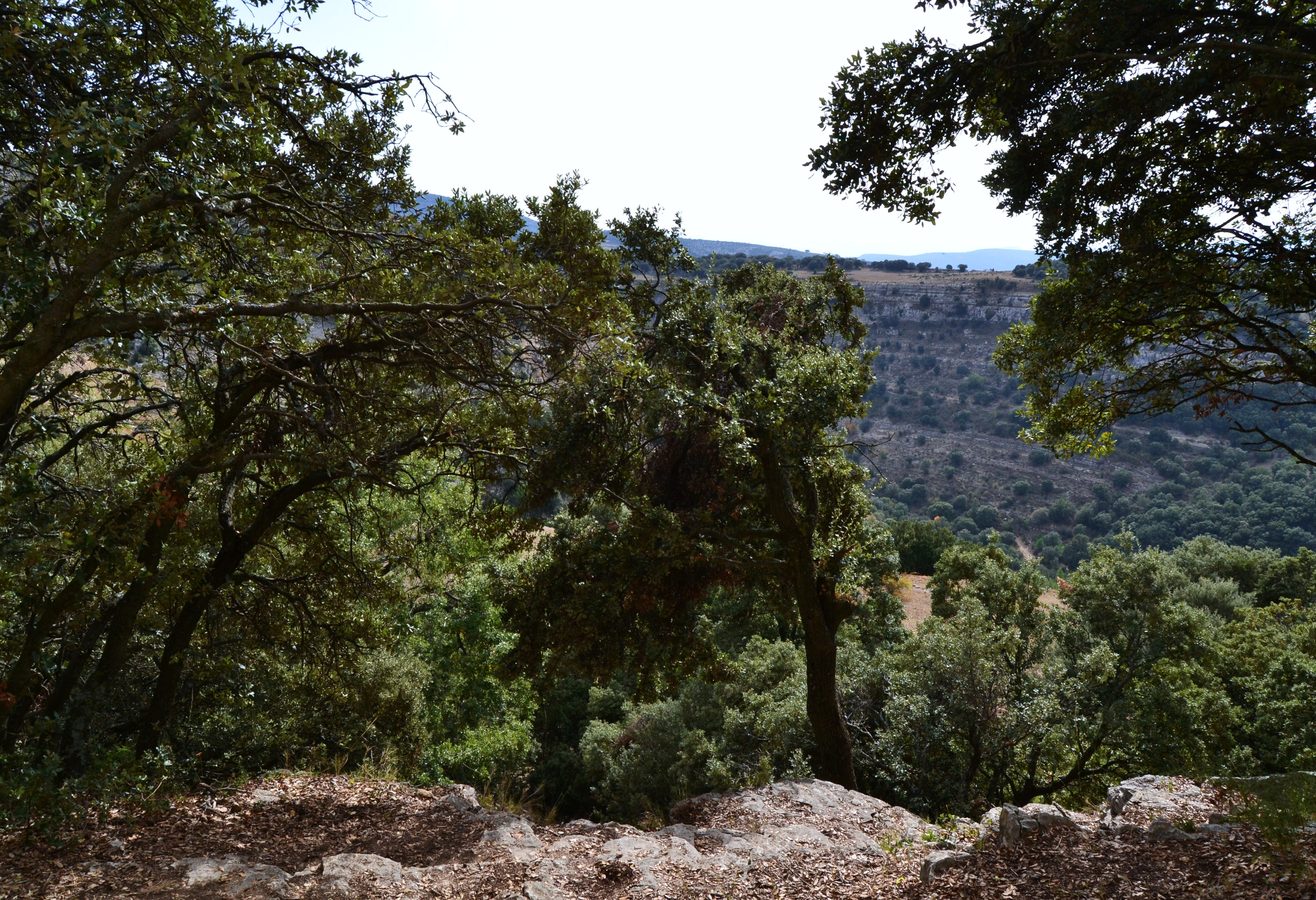 Vista des de l'entrada a la cova Remígia.